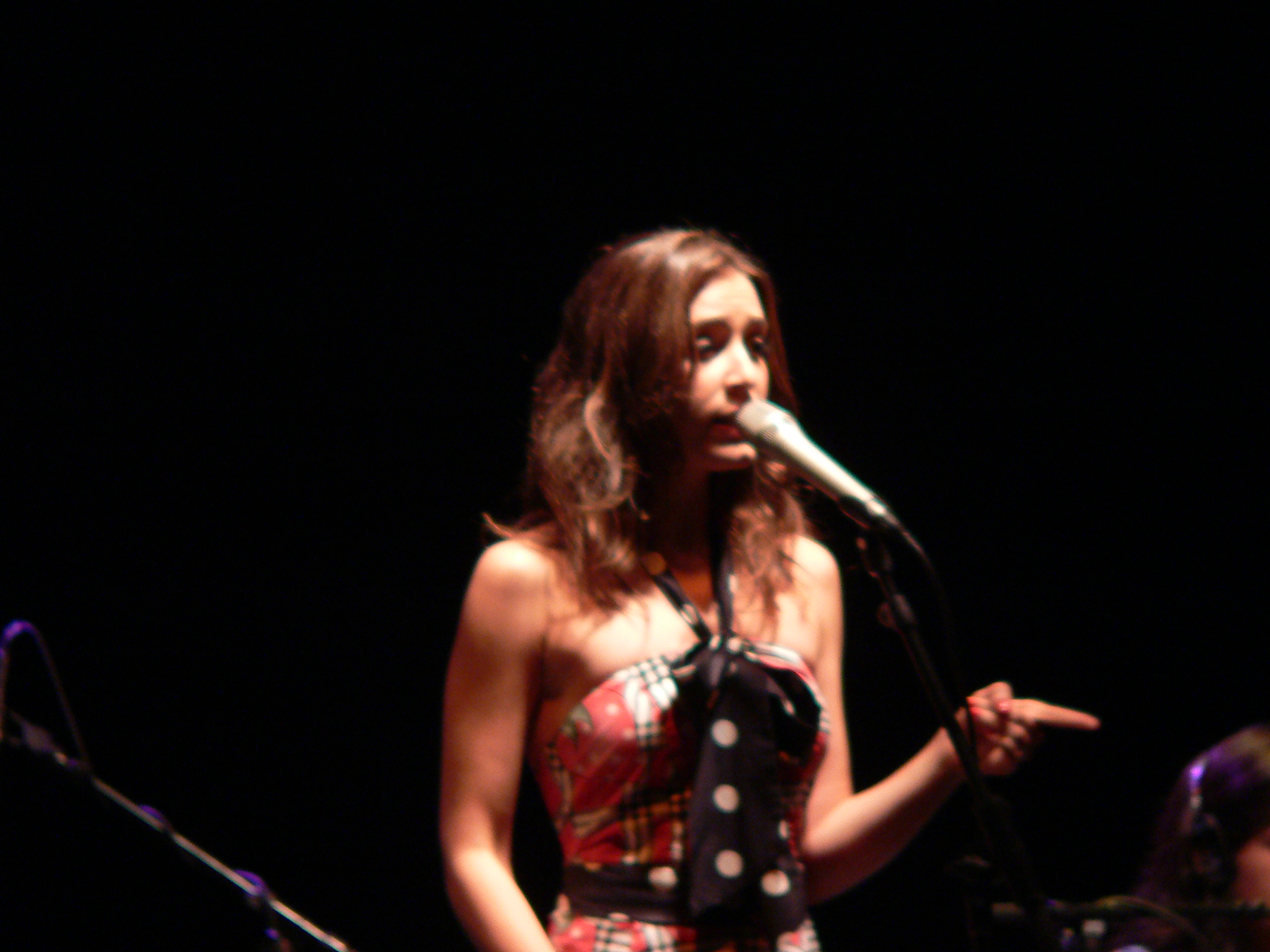 Cantora Roberta Sá pelo Flickr